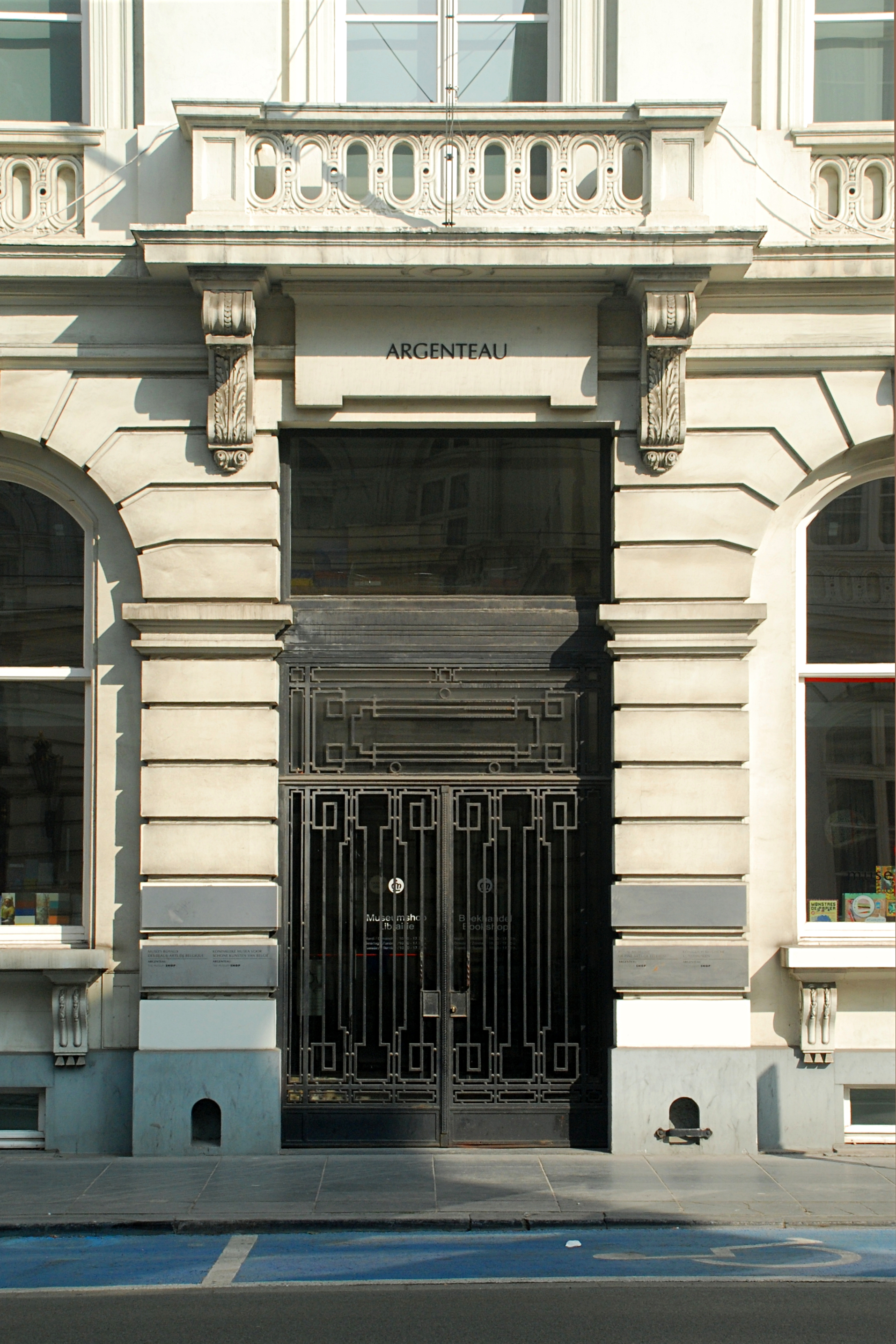 Belgique - Bruxelles - Hôtel des Brasseurs